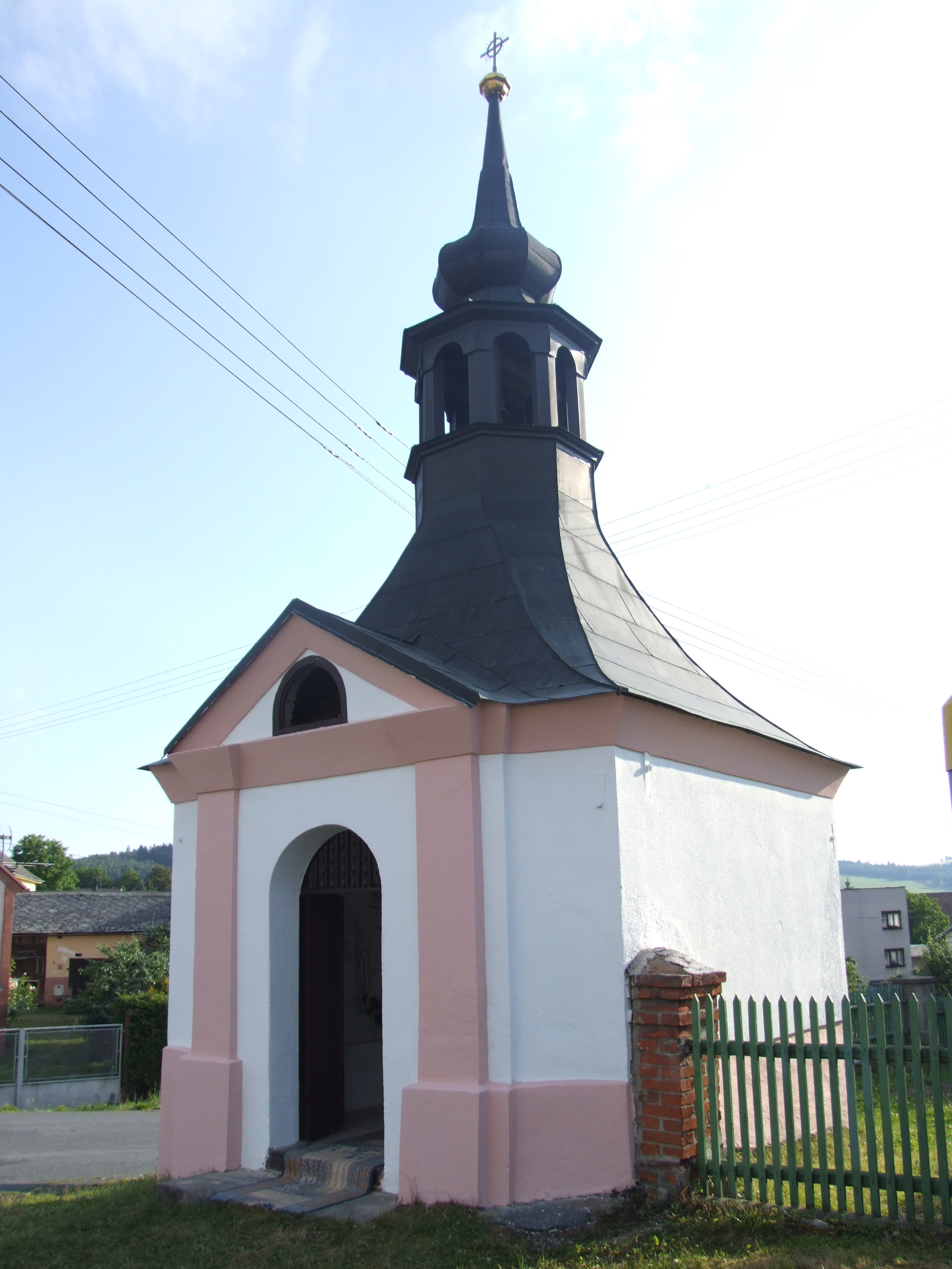 Kaplička sv. Jana Křtitele v Prapořištích